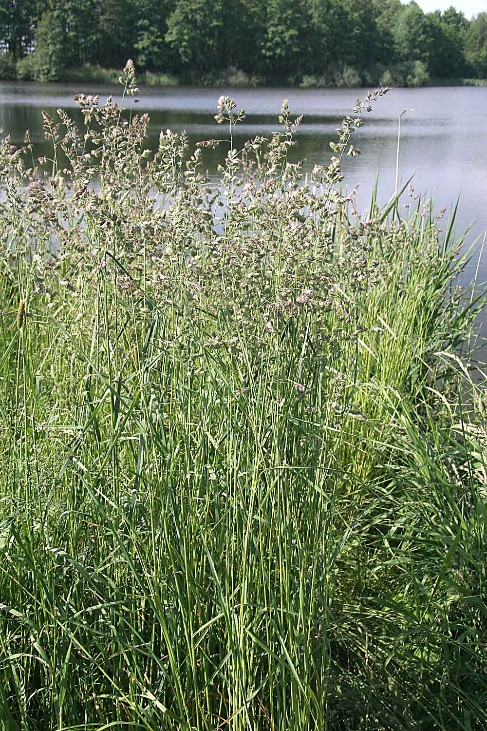 dactylis glomerata, Czech republic near Pardubice autor:Prazak